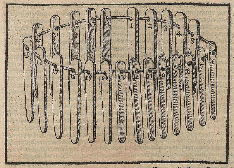 Original image description from the Deutsche Fotothek Bergwerk & Bergbau & Metallurgie & Probierwesen & Streichnadel & Probiernadeln